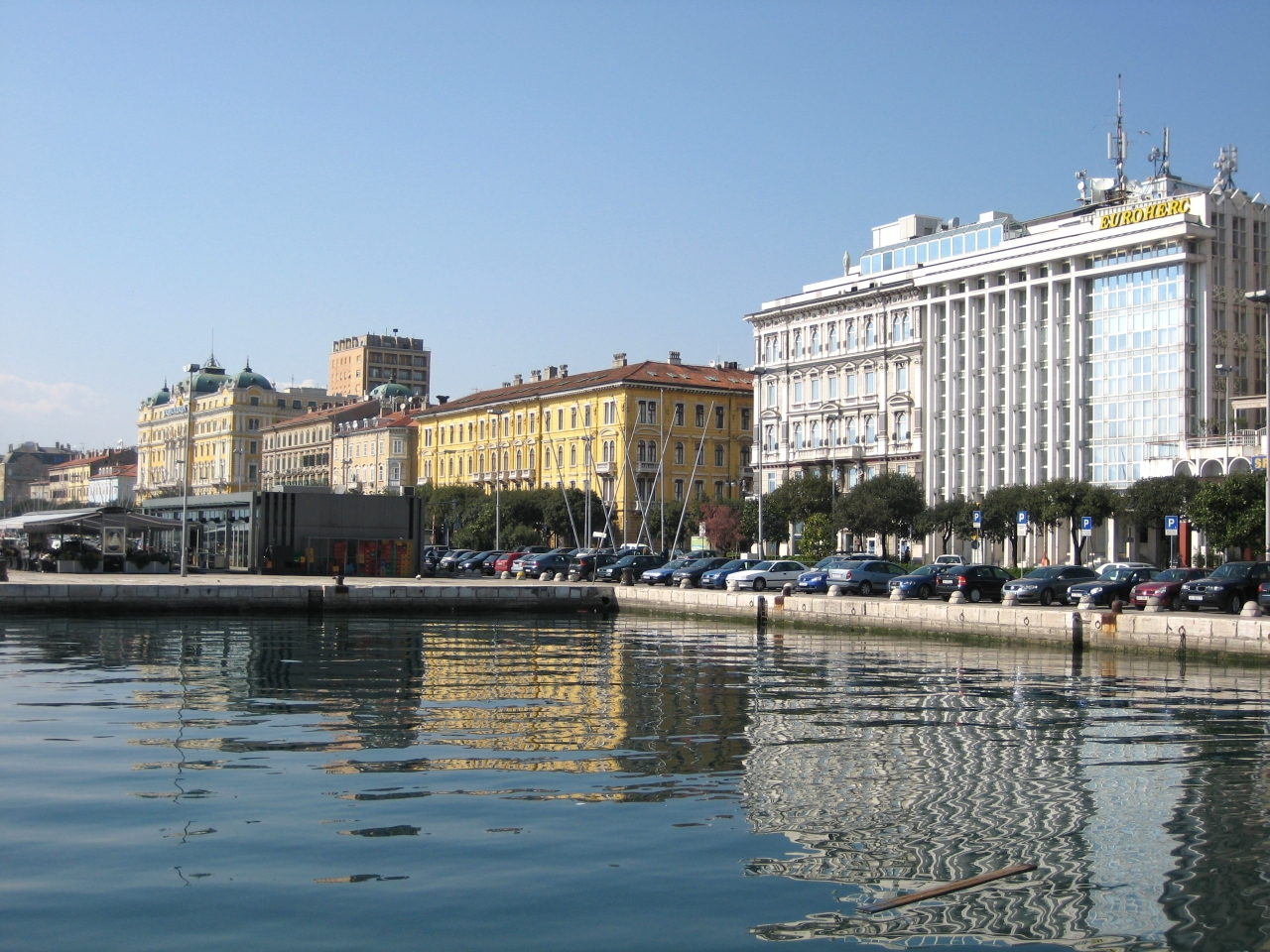 Riva sa zgradama Euroherc osiguranja, Administracije i palača Jadran u kojoj je sjedište Jadrolinije u Rijeci.